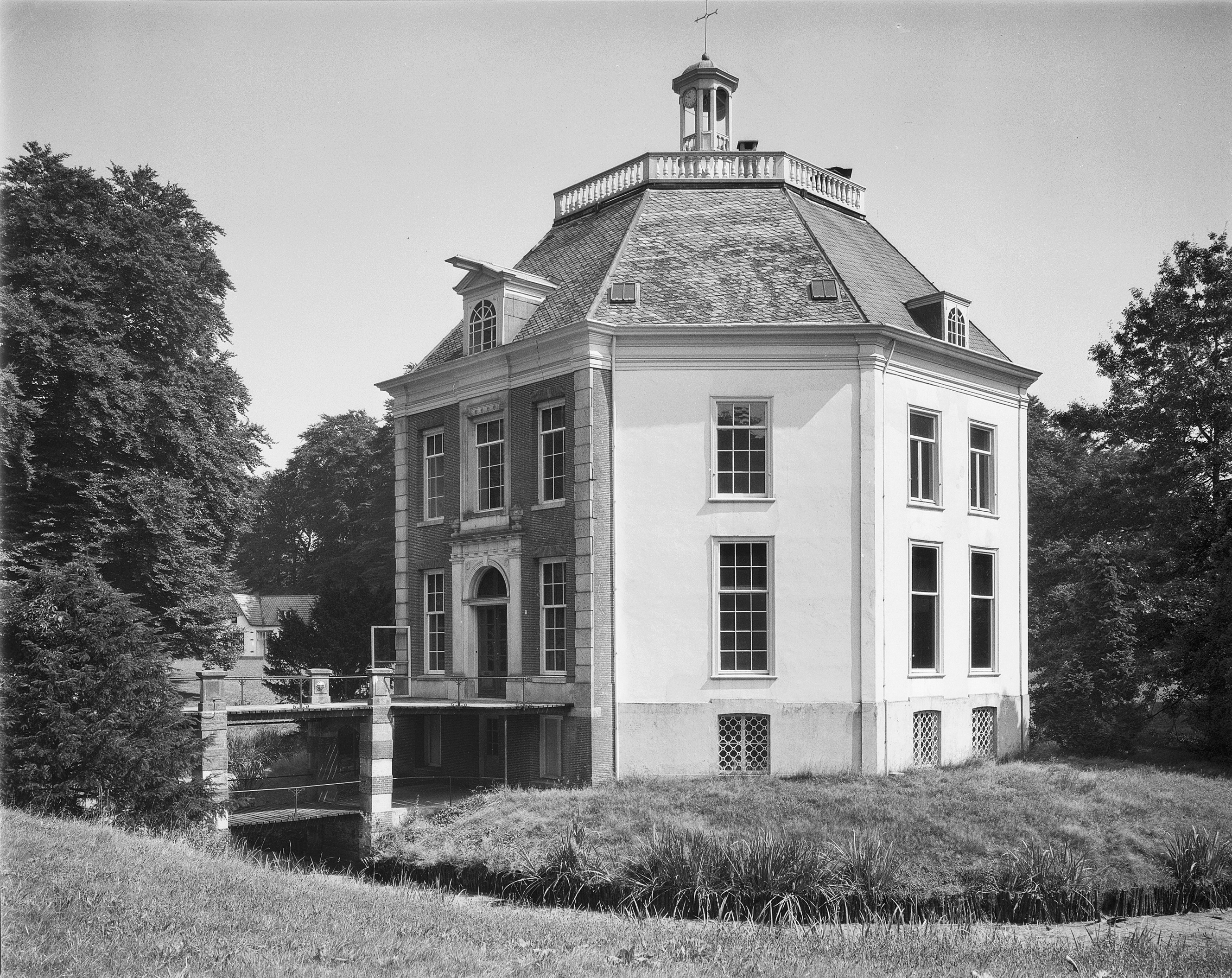 Huis Drakensteijn: exterieur naar het noord-oosten